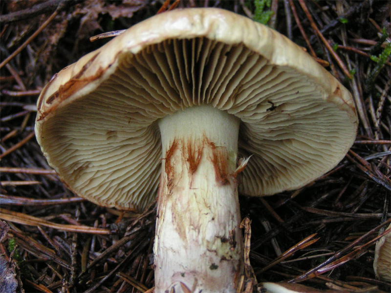 Cortinarius percomis - Cortinariaceae